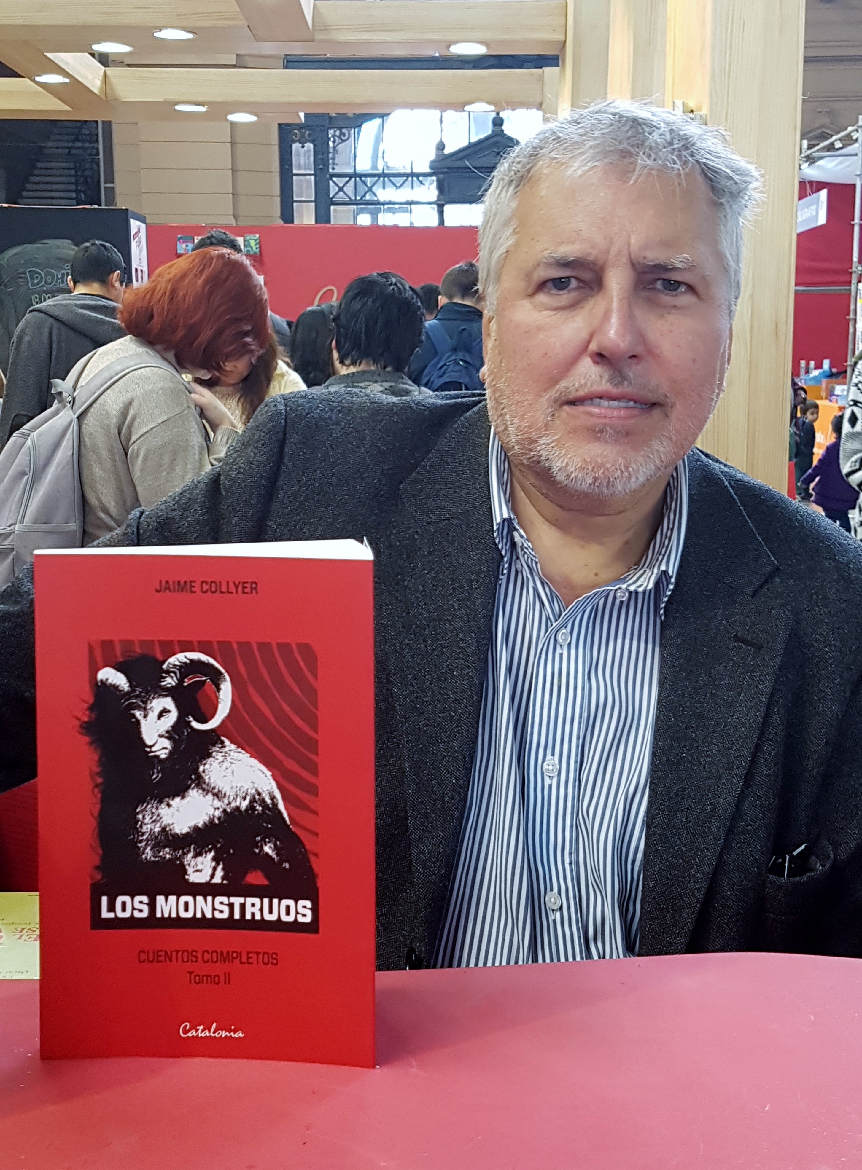 El escritor chileno Jaime Collyer en la Feria Internacional del Libro de Santiago 2017.